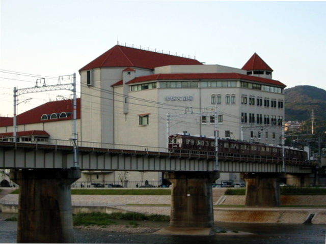 Hankyu Imazu Line train passes by Takarazuka Grand Theater, Takarazuka, Hyogo, Japan 兵庫県宝塚市、宝塚大劇場と阪急今津線の列車